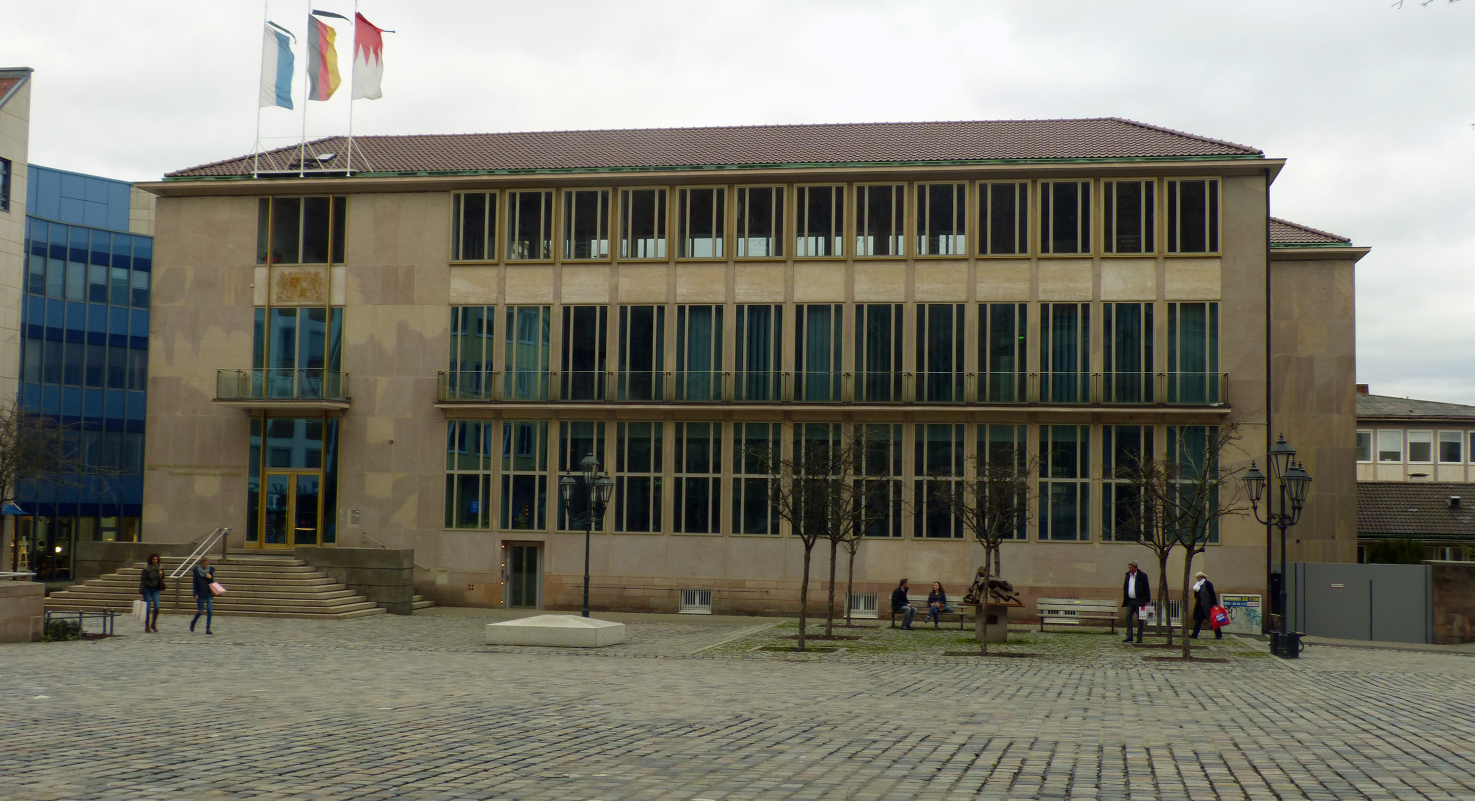 Bayerisches Staatsministerium der Finanzen, für Landesentwicklung und Heimat, Nürnberg. Ansicht von Vorne, Bankgasse 9, 90402 Nürnberg